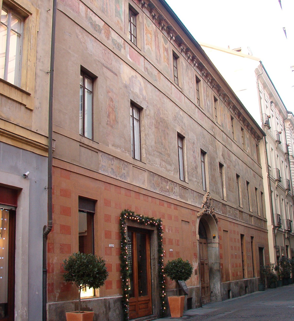 Palazzo Scaglia di Verrua - Torino - Italy